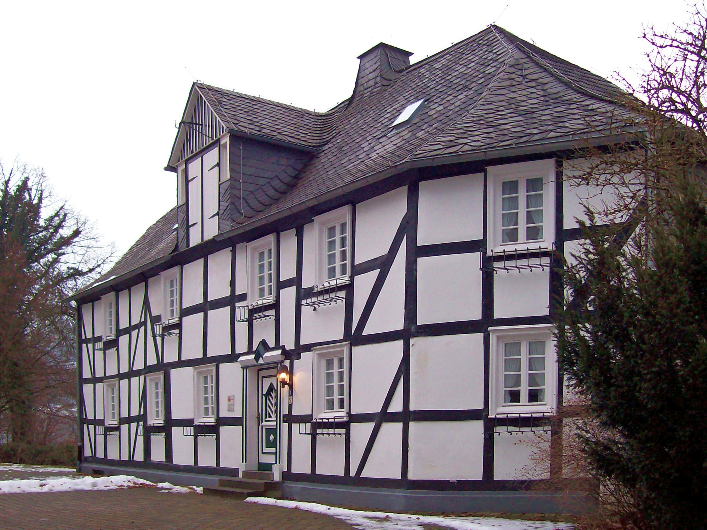 Denkmalgeschütztes Bürgerhaus aus dem 18. Jahrhundert (sog. Schmalen Haus) im historischen Stadtkern von Schmallenberg (Germany). Errichtet auf den Resten eines sechseckigen Turmes der Stadtmauer. 1985/86 zum Stadtarchiv ausgebaut.